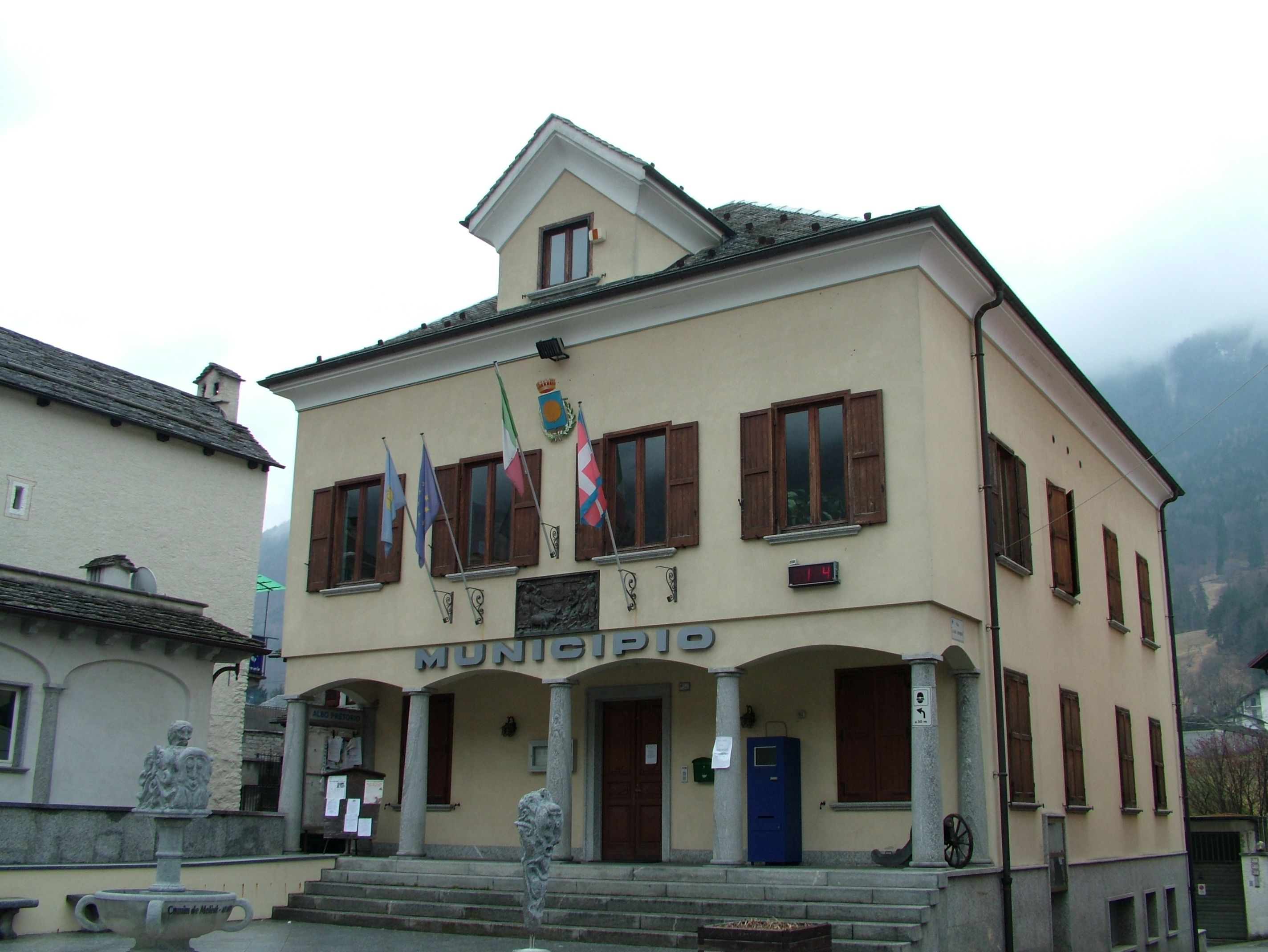 Malesco, Piemont, Italien, Municipio, das Rathaus